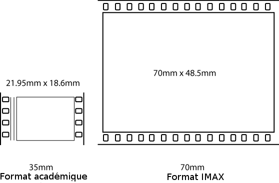 Montage à partir de l'image anglaise : (une comparaison du 35 et du 70 mm, créée par Kaereachi, sans précision de copyright).